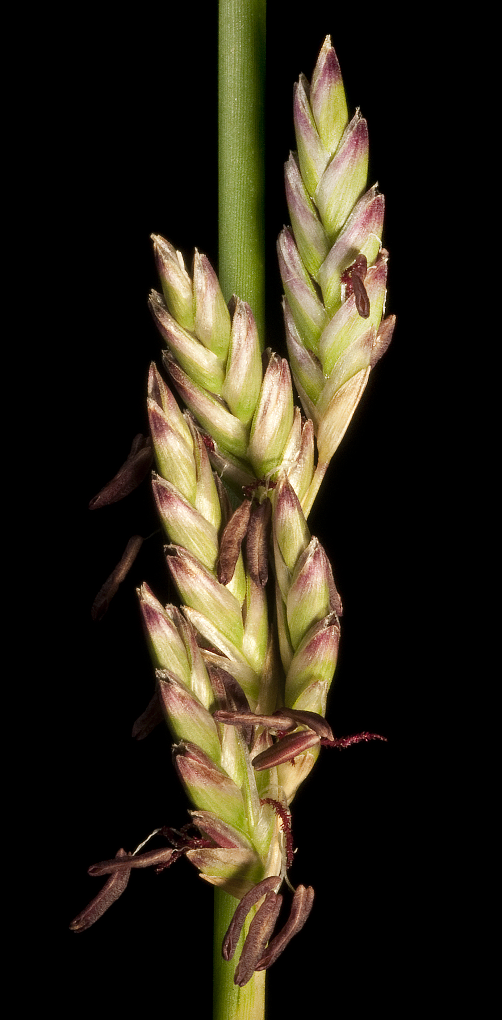 KRT4688